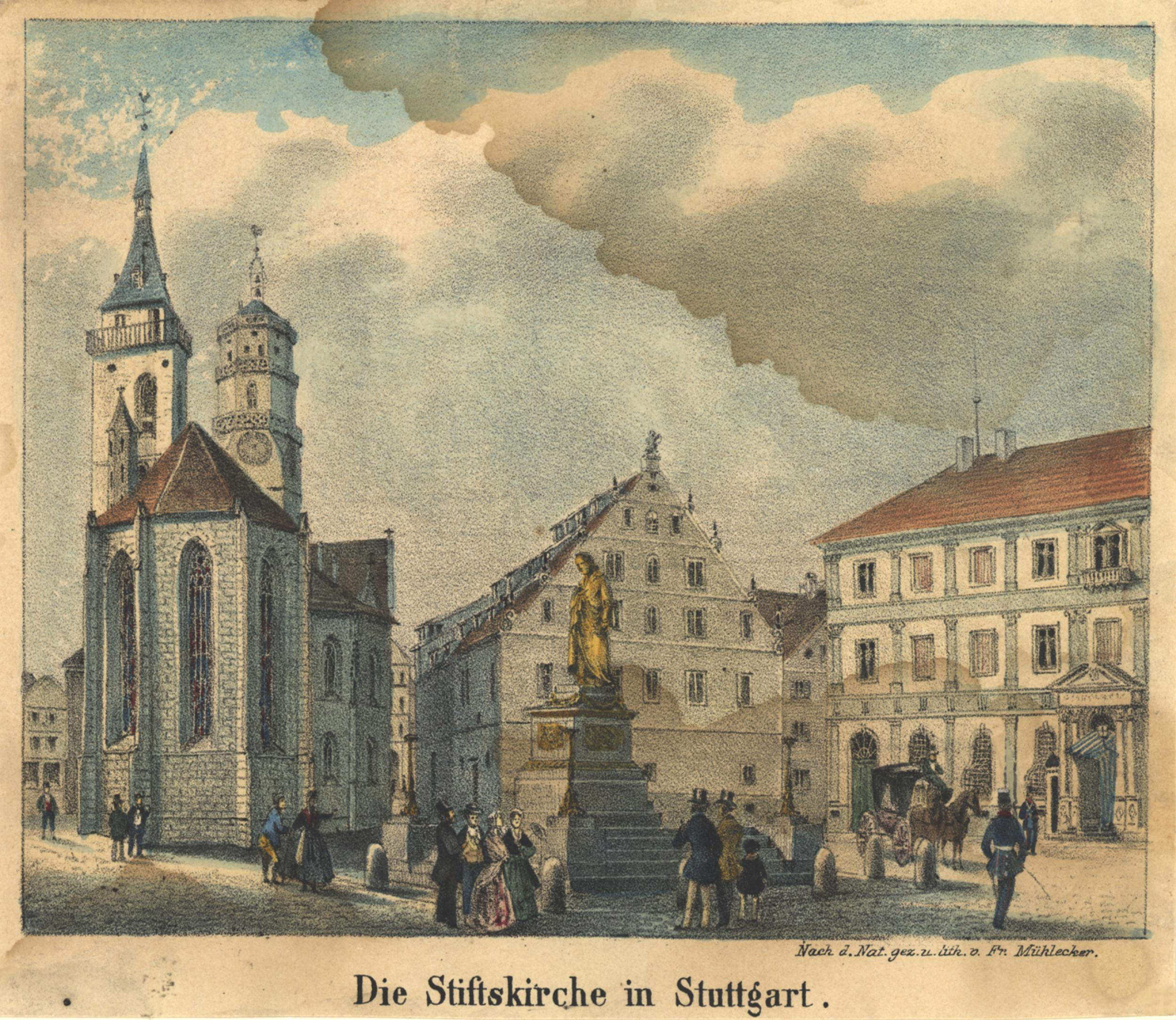 Stiftskirche in Stuttgart, Zeichnung und Lithographie von Fr. Mühlecker (Schefold 8263)